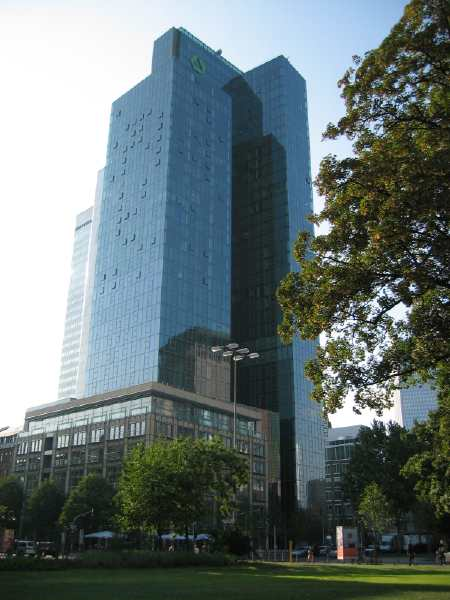 Gallileo Hochhaus